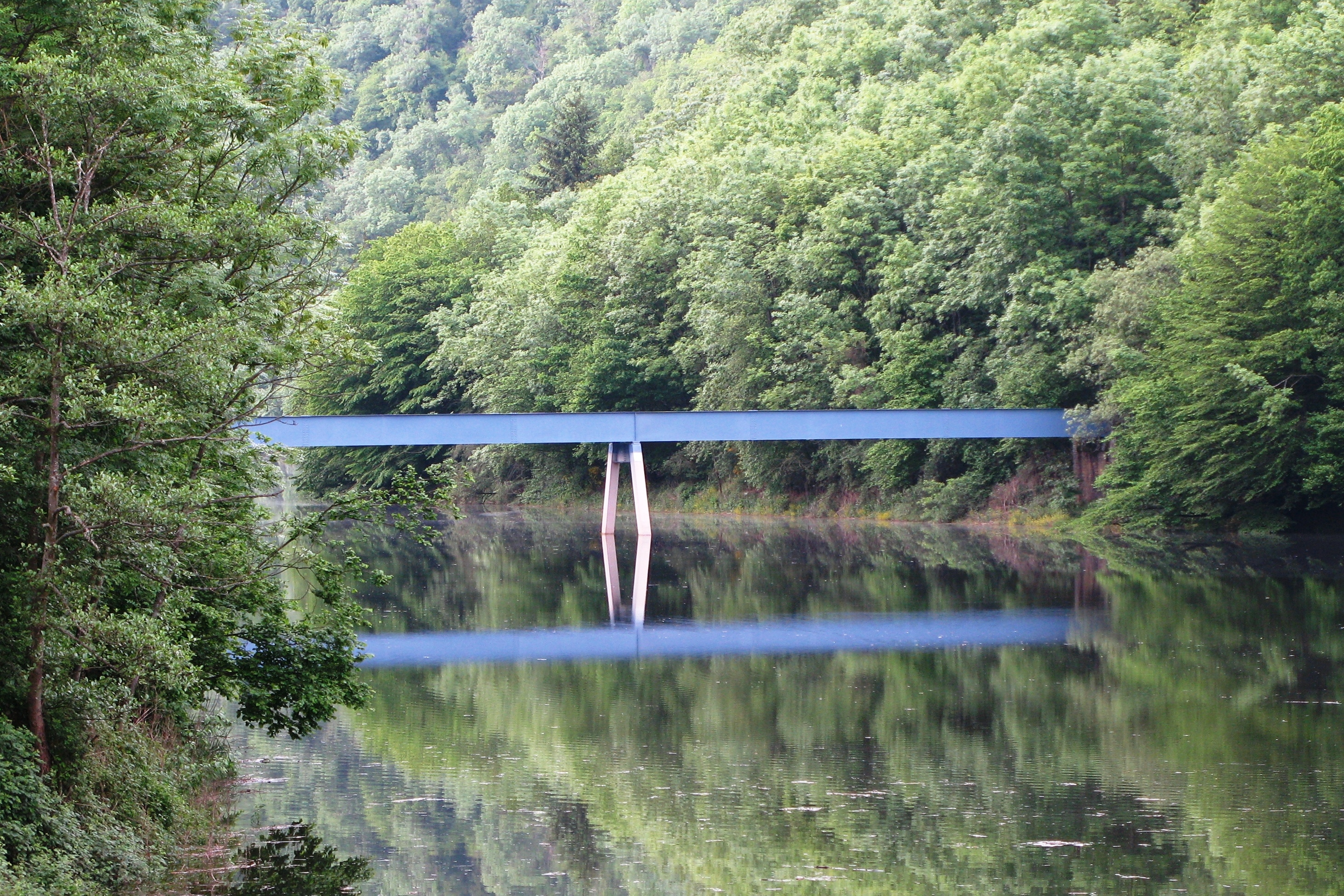 D'Foussgängerbréck zu Biwels